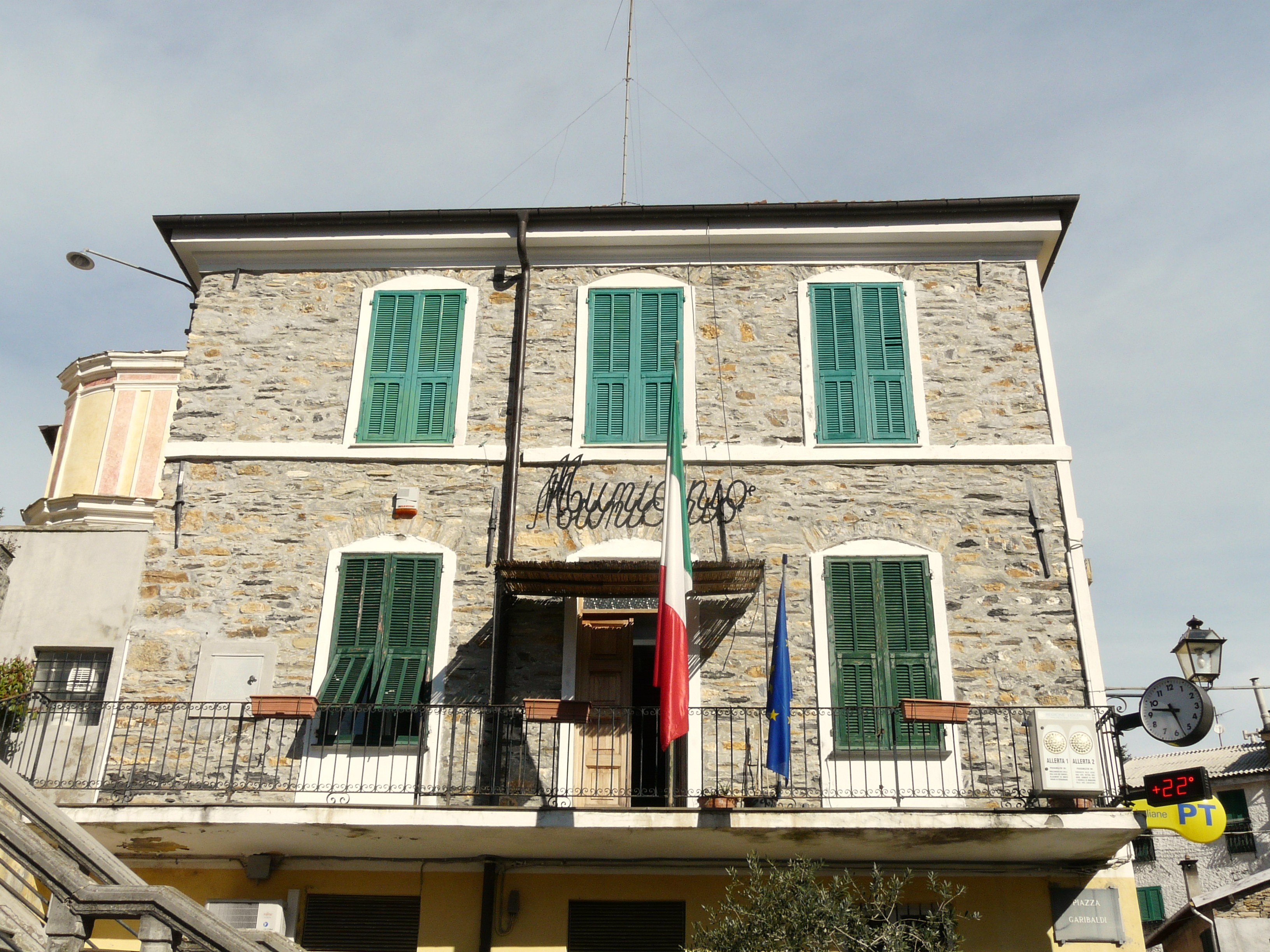 Municipio di Carpasio, Liguria, Italia